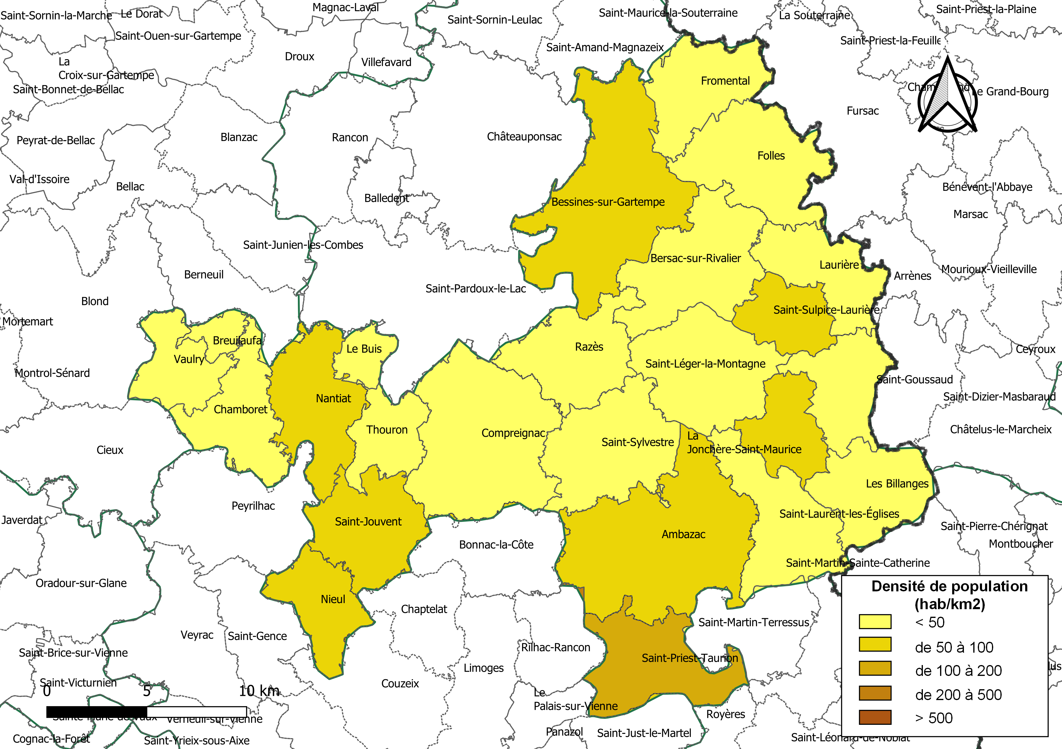 Carte des densités de population (millésimée 2016) des communes de la Communauté de communes Élan Limousin Avenir Nature, département de la Haute-Vienne, France. Composition au 1er janvier 2019.